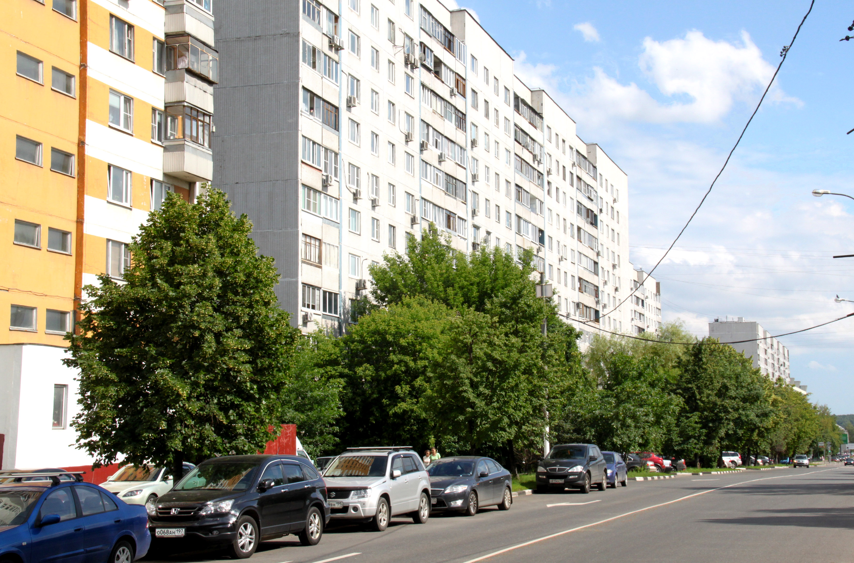 Луганская улица Москвы